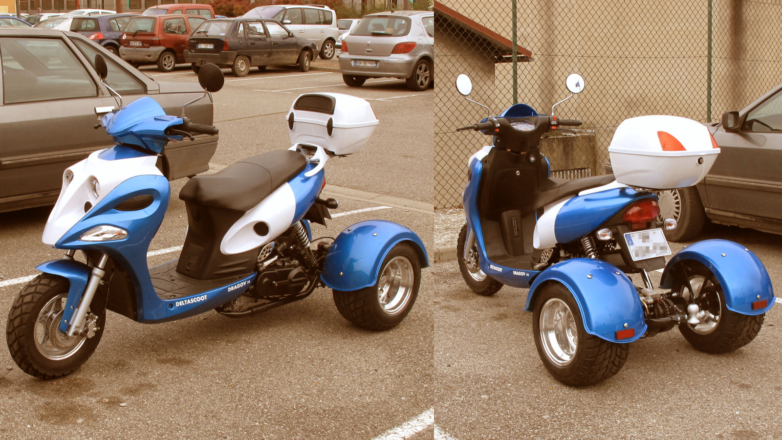 Scooter 50cc avec 3 roues de marque DELTASCOOT